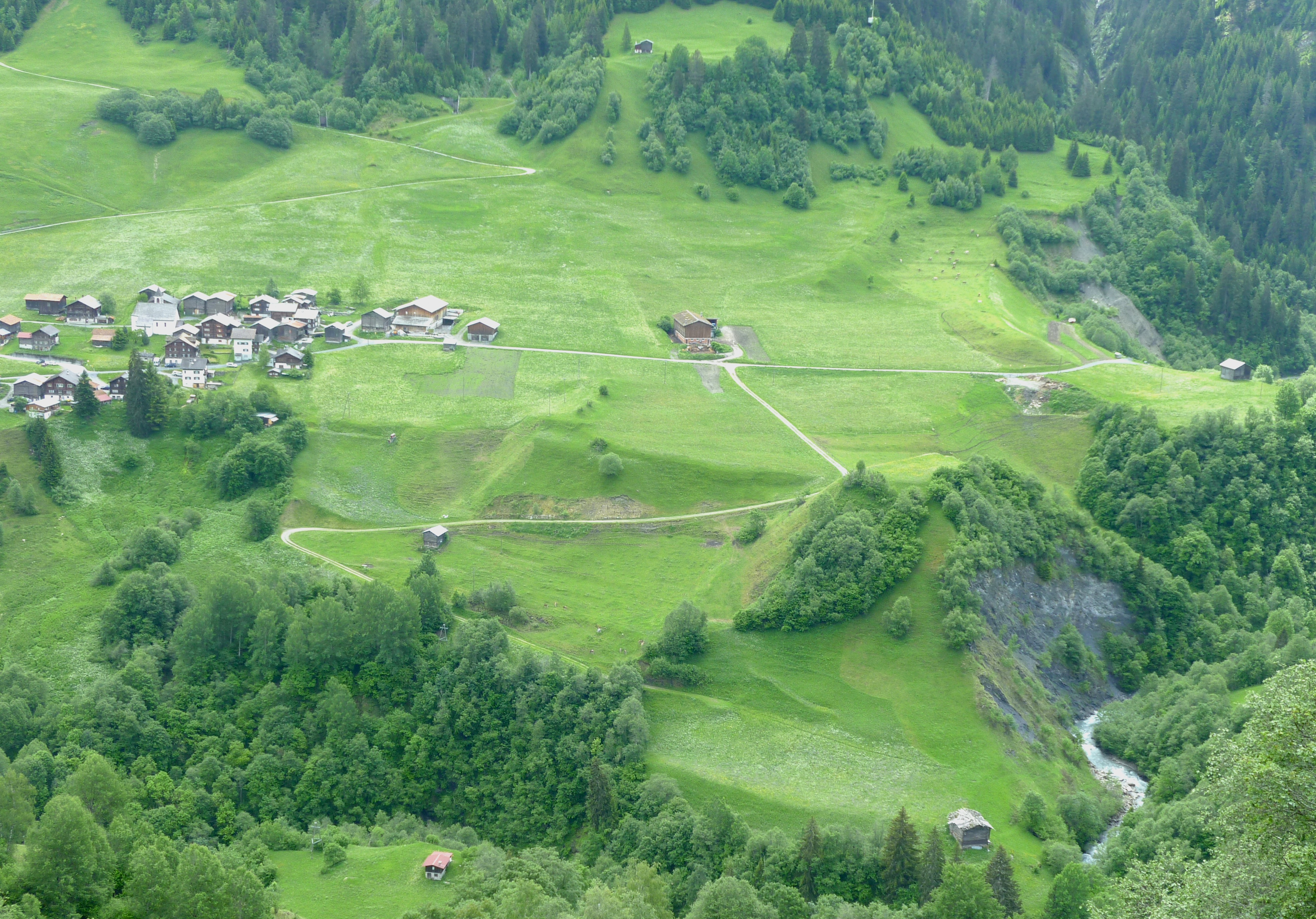 Der Hügel von Crestaulta bei Lumbrein GR, rechts des Dorfes oberhalb des Baches